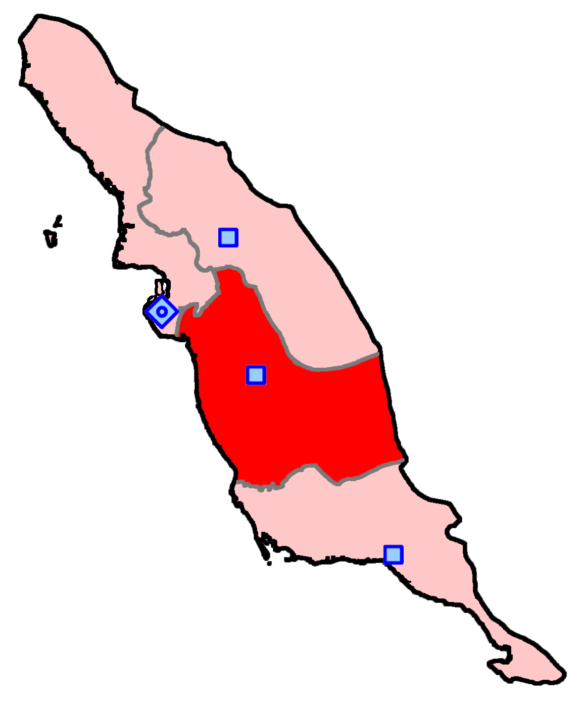 حوزهٔ انتخاباتی دشتی و تنگستان برای انتخابات مجلس شورای اسلامی